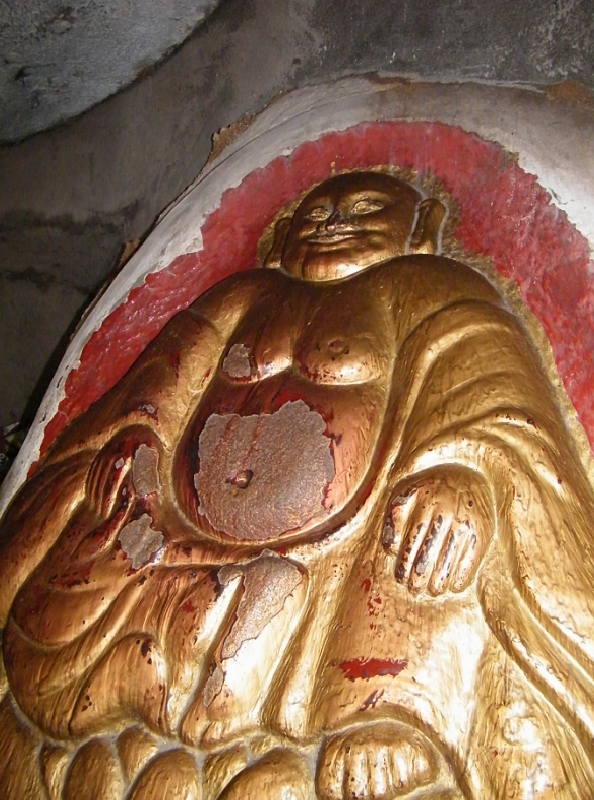 青云岩弥勒佛石刻